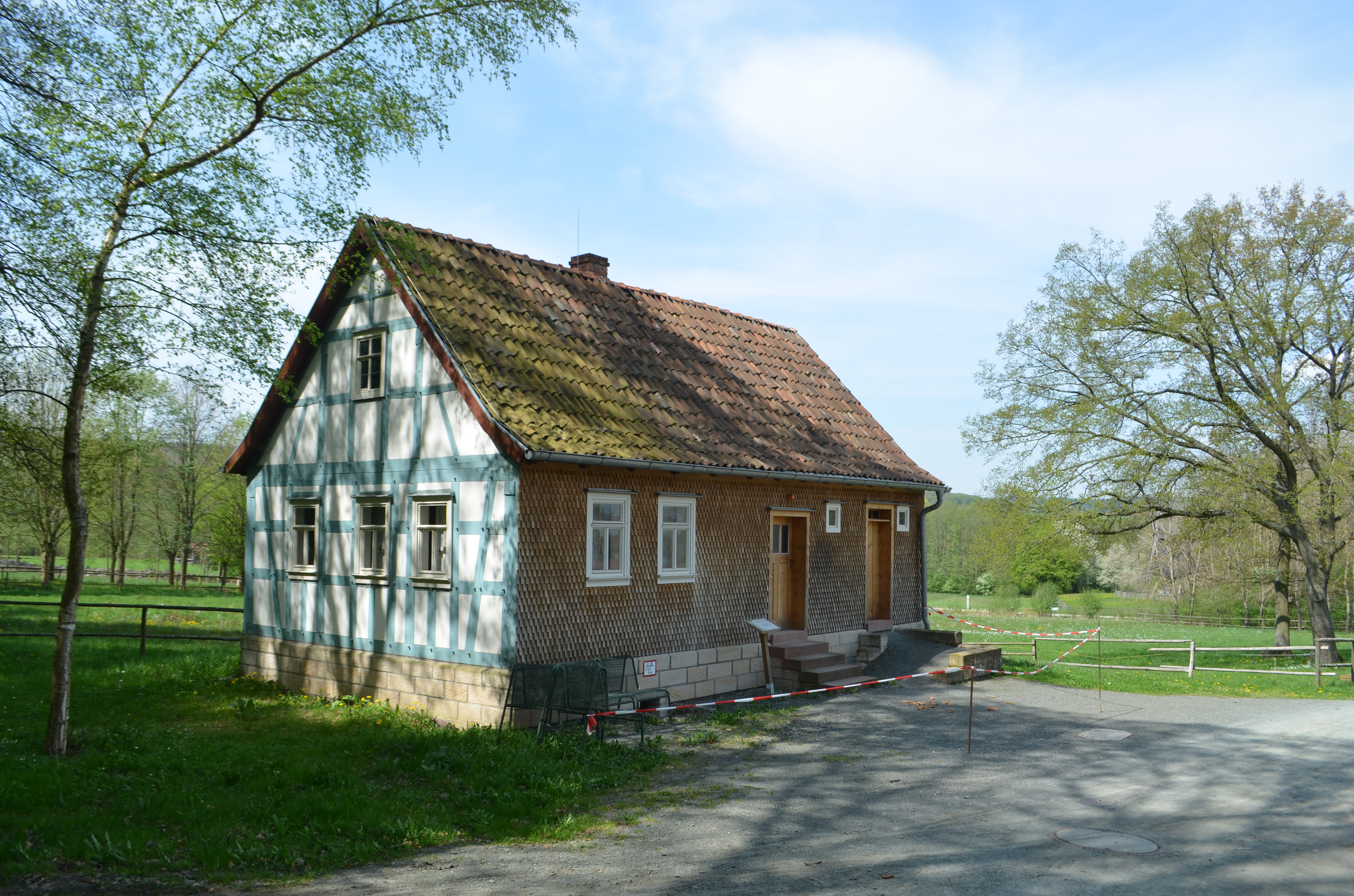 Hessenpark, Altenteilerhaus aus Sieblos